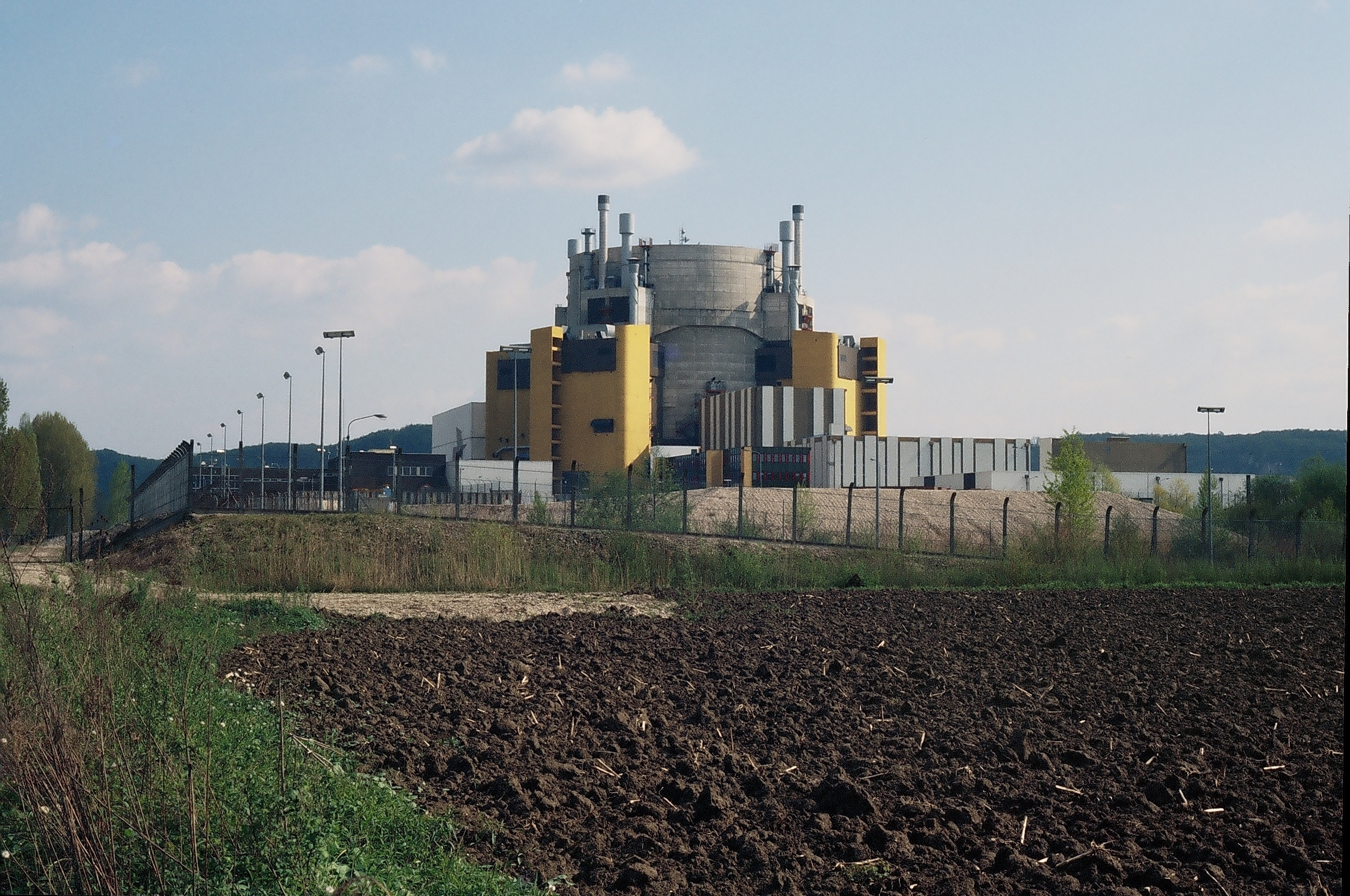 Superphénix, Isère, France.